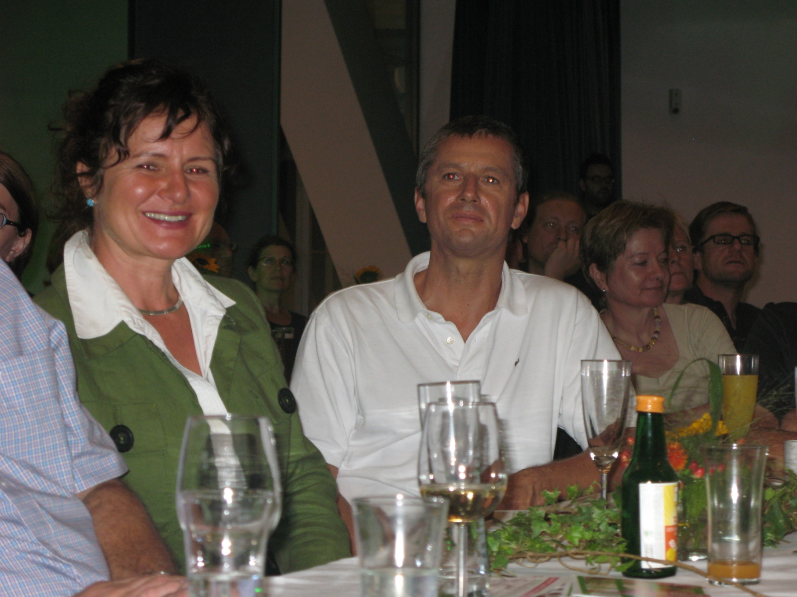 Die Grünen Landtagsabgeordneten in Oberösterreich Maria Wageneder und Markus Reitsamer